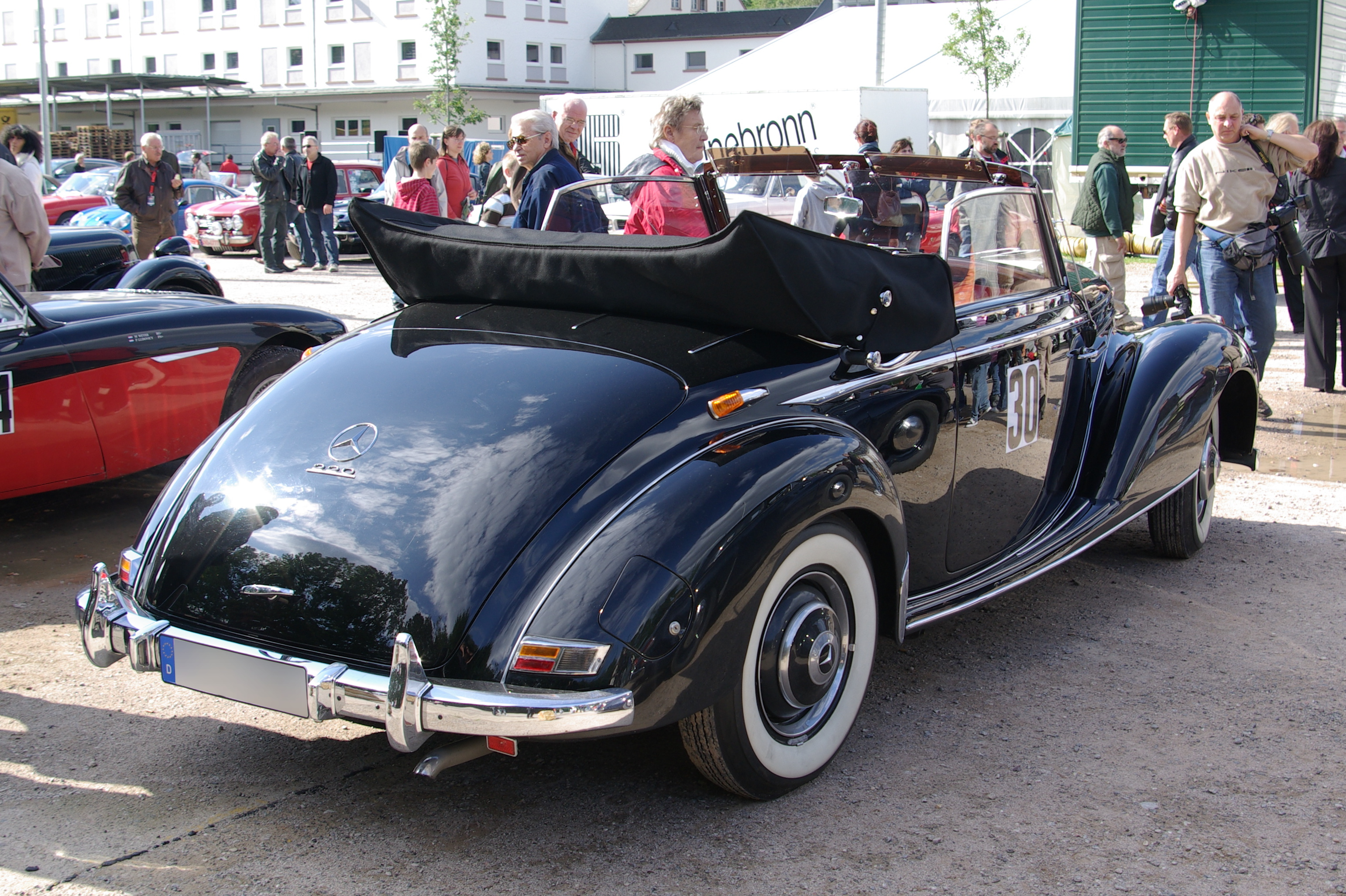 Mercedes Benz 220 W 187 Cabrio A Baujahr 1953